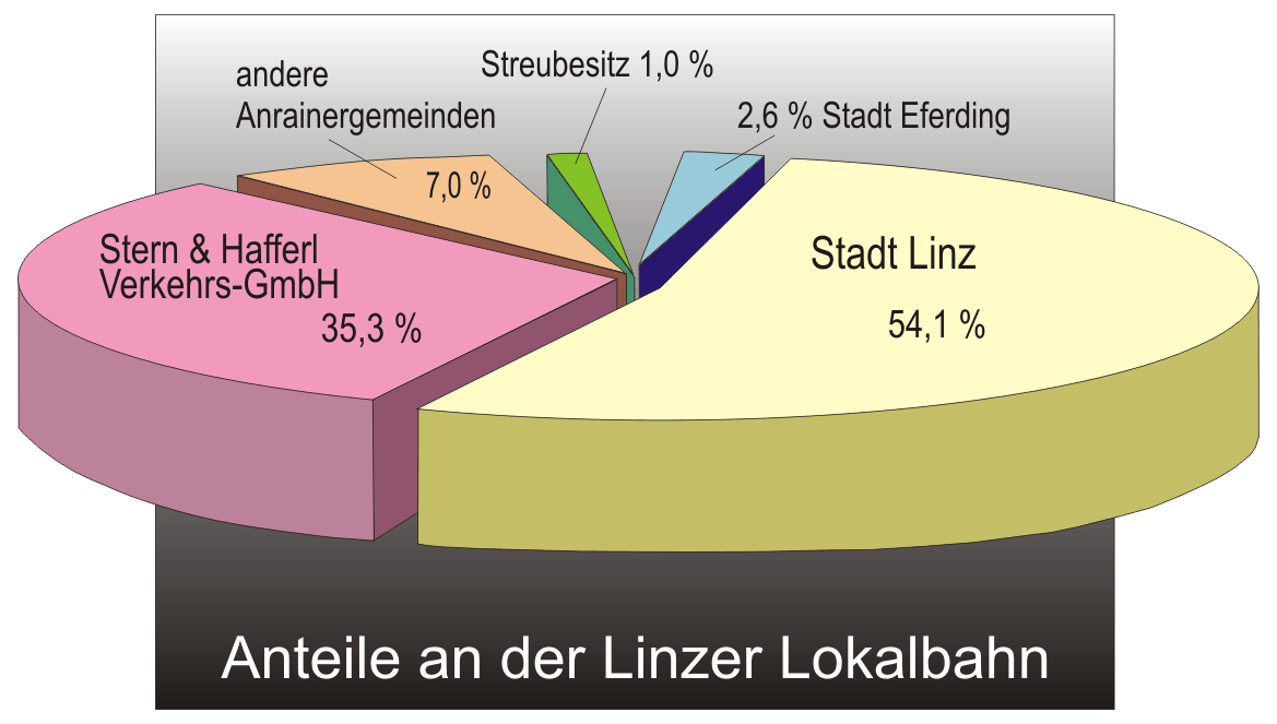 Diagramm: Anteilsverteilung an der Linzer Lokalbahn